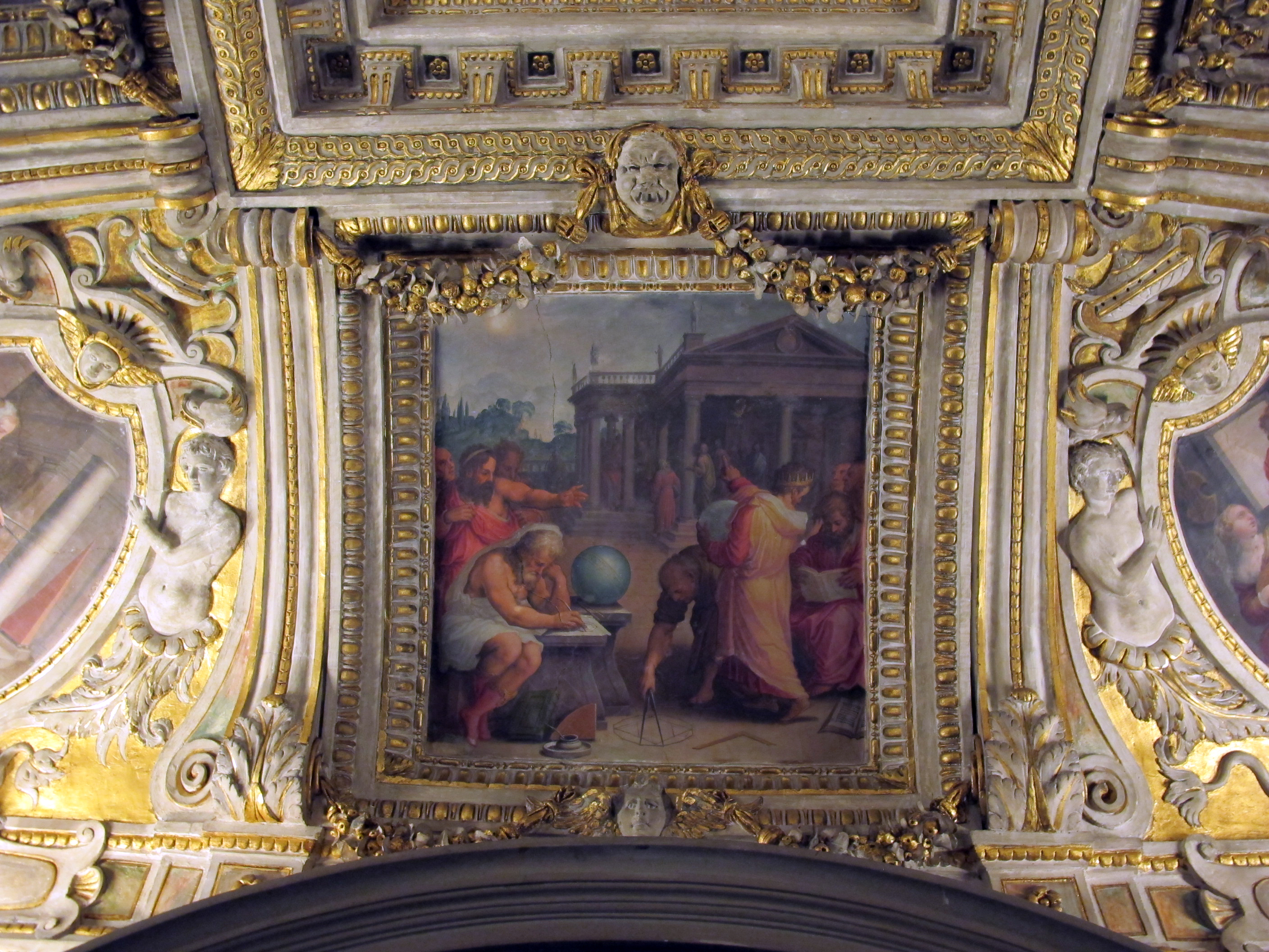 Tesoretto di cosimo I, volta, astronomia